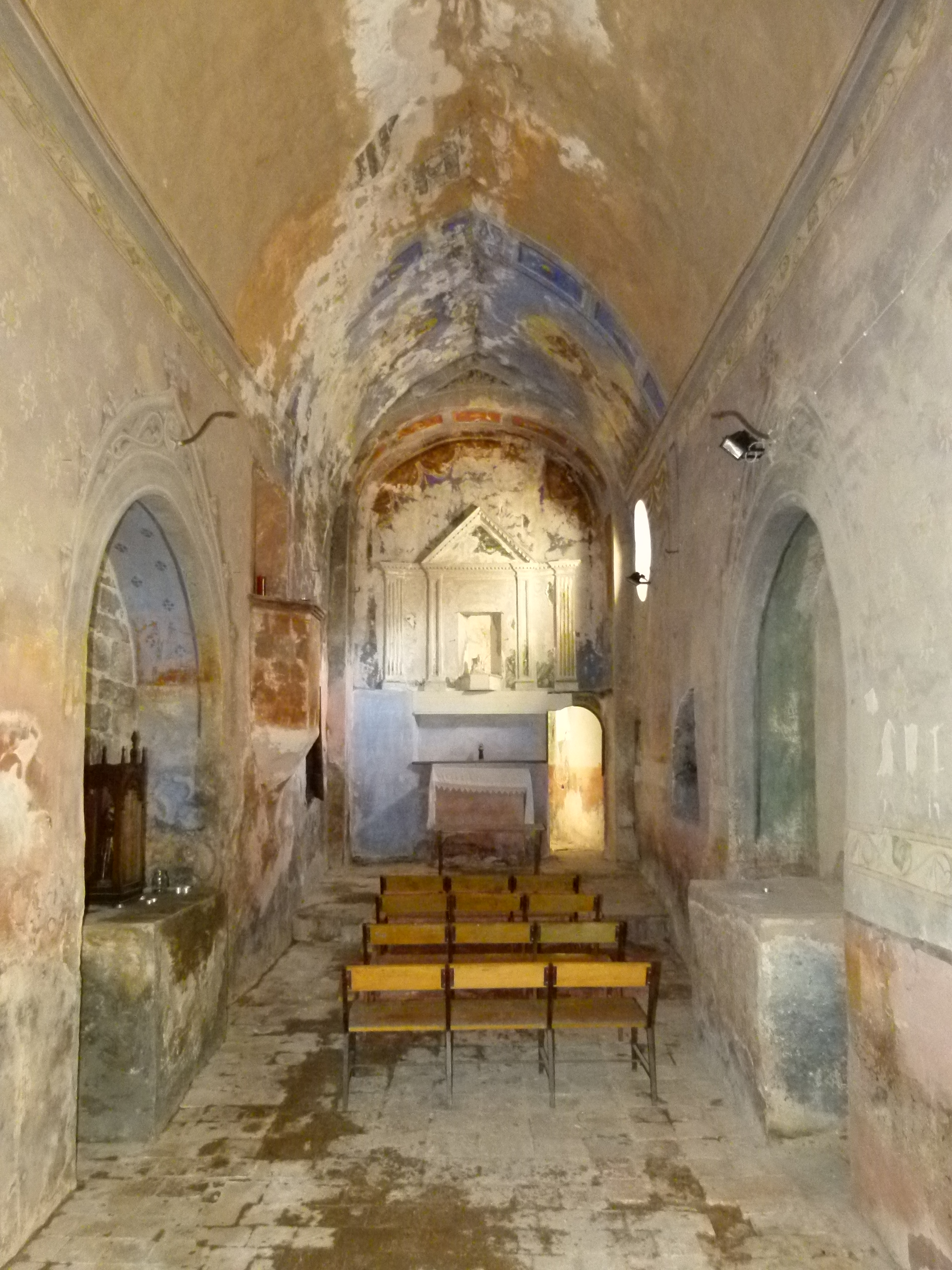 Església de Santa Maria de Bolós (Camprodon)